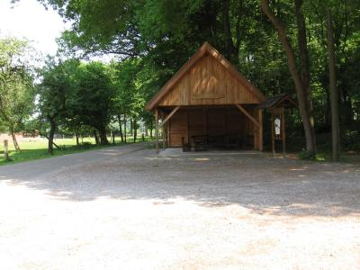 Von der Nachbarschaft in Eigenregie erstellter Fahrradrastplatz und Informationstafel des Heimatvereins neben der historischen Poststation Suendarp.